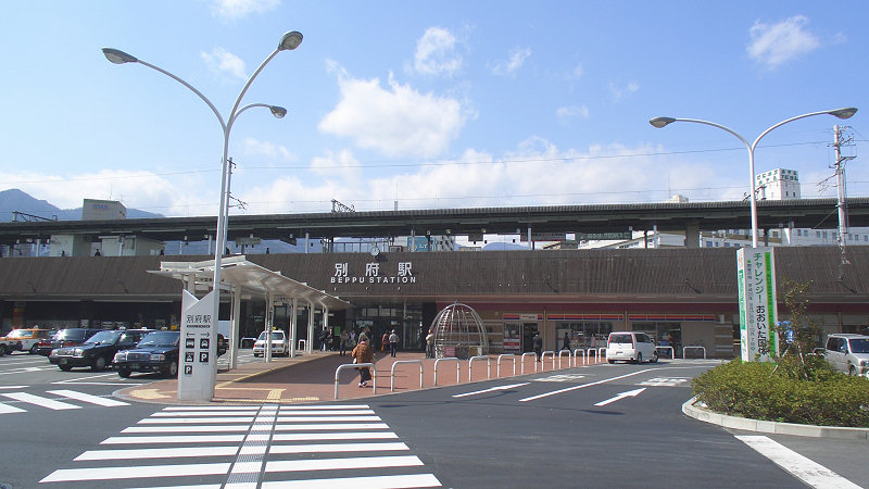 JRja:日豊本線別府駅 東口（海岸口） 撮影者/著者/著作権保有者 : MK Products (本人がアップロード) 撮影日 : 2007/03/05 別府駅用にアップロードした画像です。良い画像があれば別の画像に変えてください。